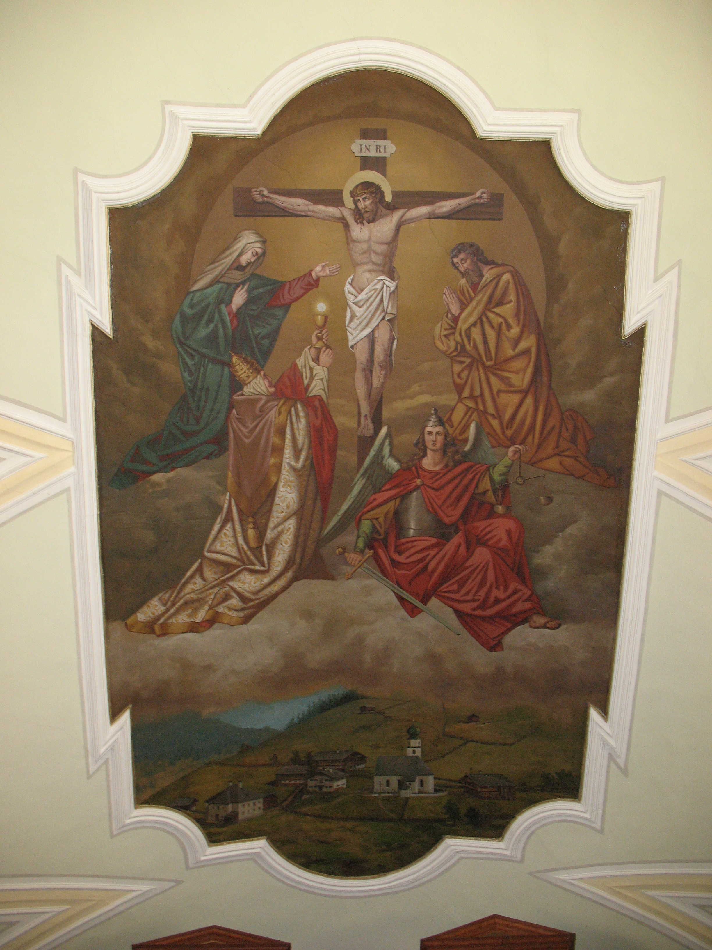 Kath. Pfarrkirche hl. Michael und Friedhof mit Kapelle